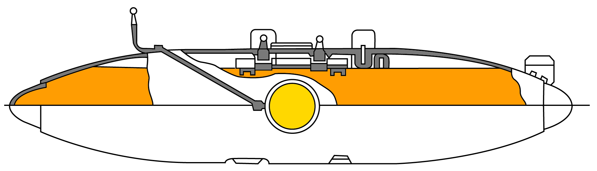 ЗБ